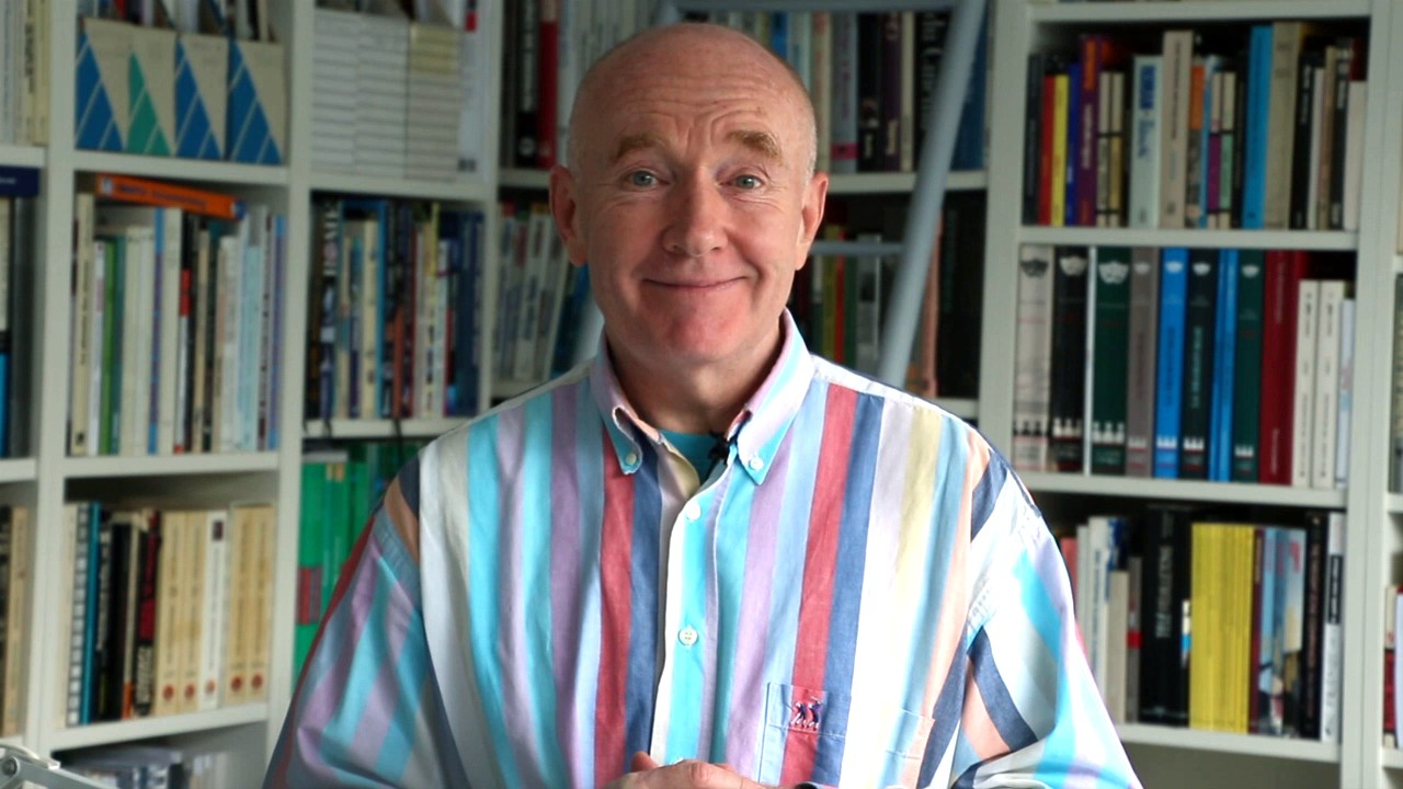 A picture of Yves Lavandier.